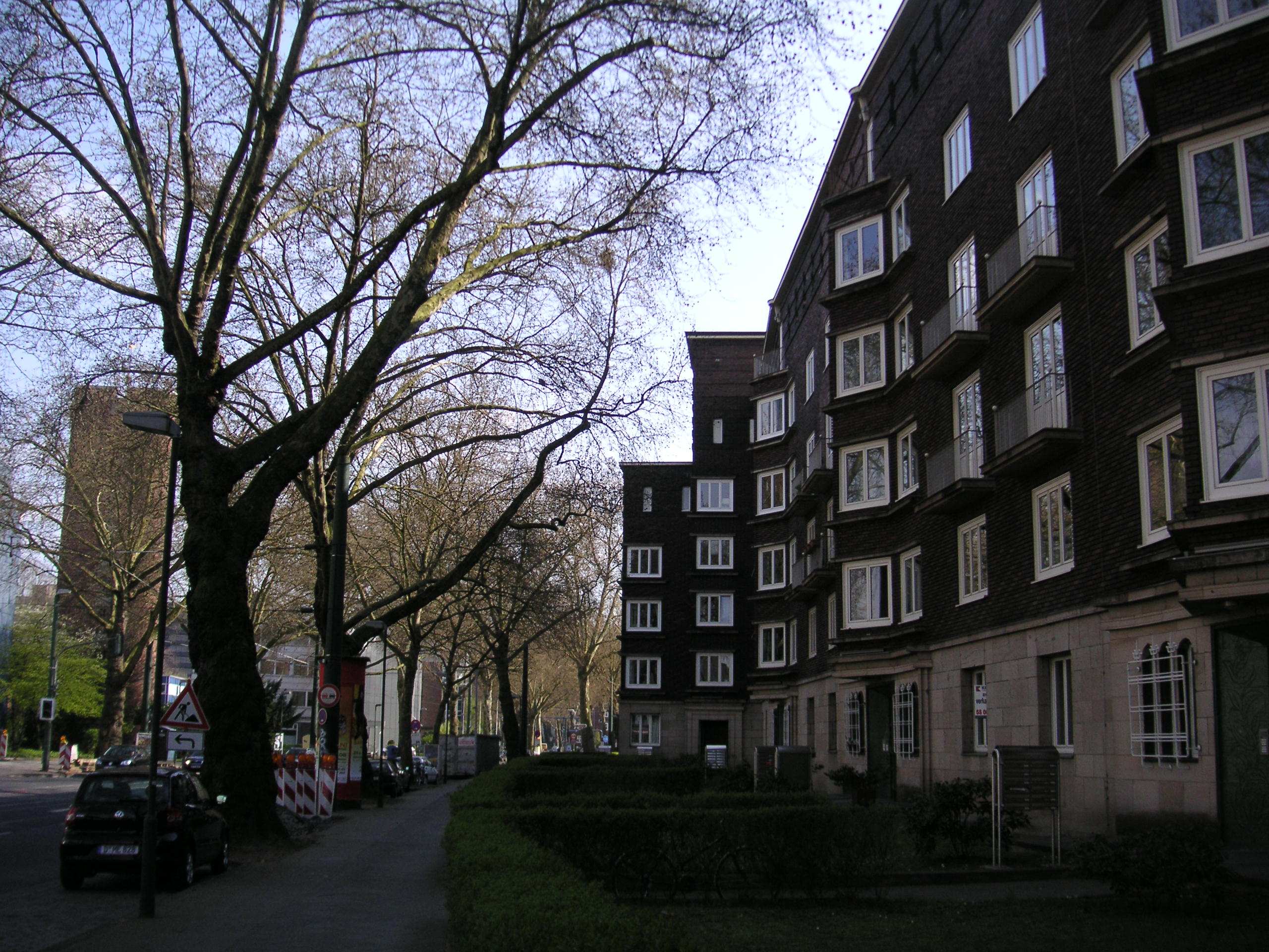 Kaiserswerther Straße Nr. 220 - 226 Rheinparksiedlung